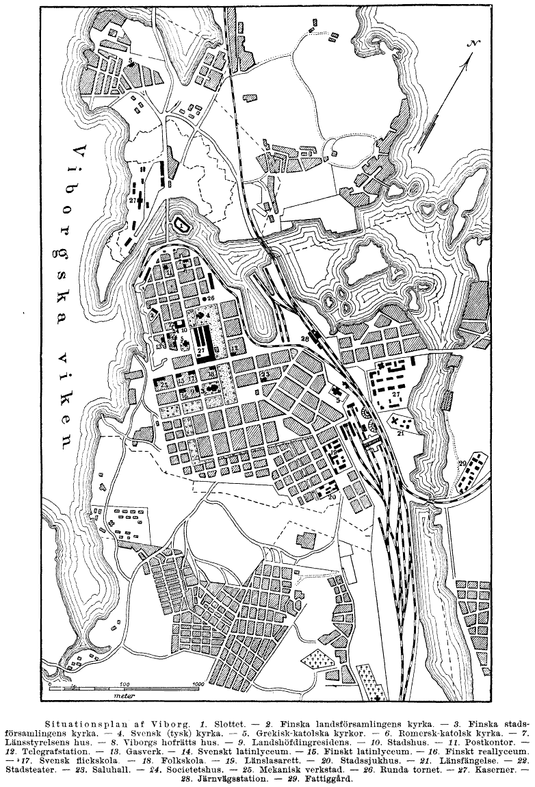 Karta över Viborg under tidigt 1900-tal (senast 1921)